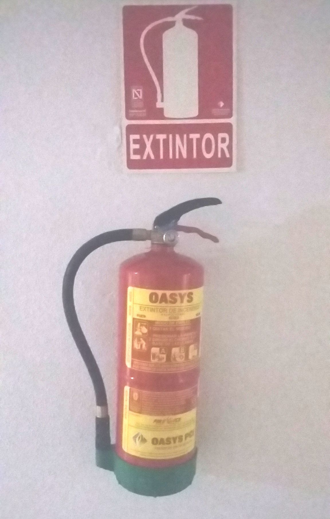 Extintor de incendios, y sobre él el símbolo que legalmente debe utilizarse para facilitar su localización